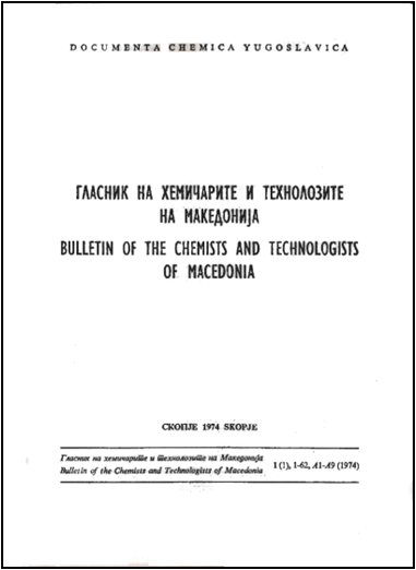 Корица од насловната страна од првиот број на списанието